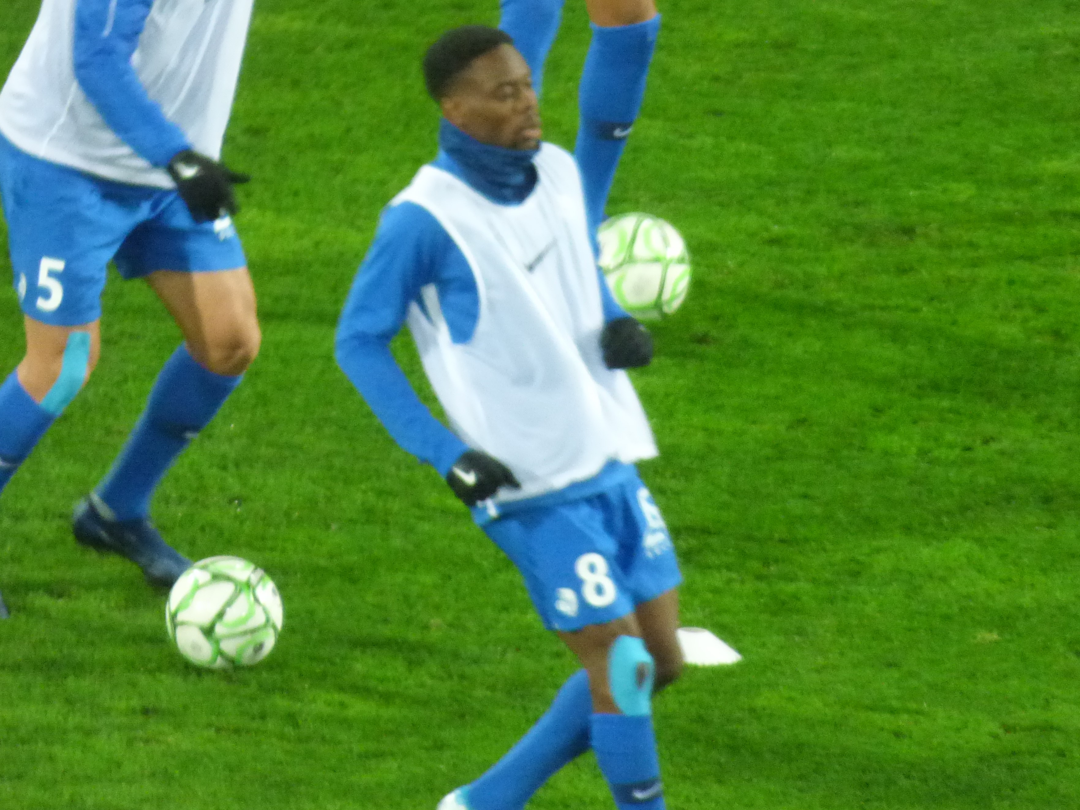 Jonathan Tinhan lors du match RC Lens / Grenoble Foot 38, le 10 février 2020, comptant pour la vingt-quatrième journée du championnat de France de football de Ligue 2 2019-2020, au Stade Bollaert-Delelis.